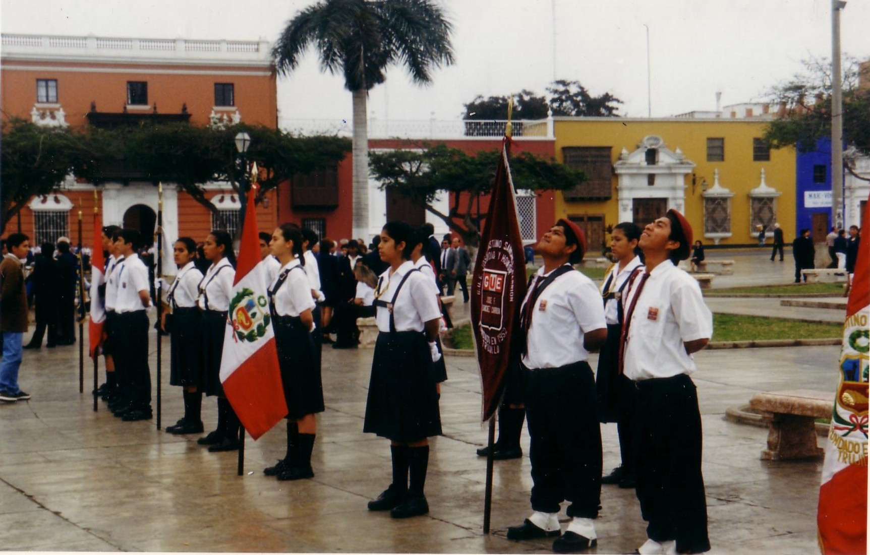 Plaza de Armas, Trujillo, Peu